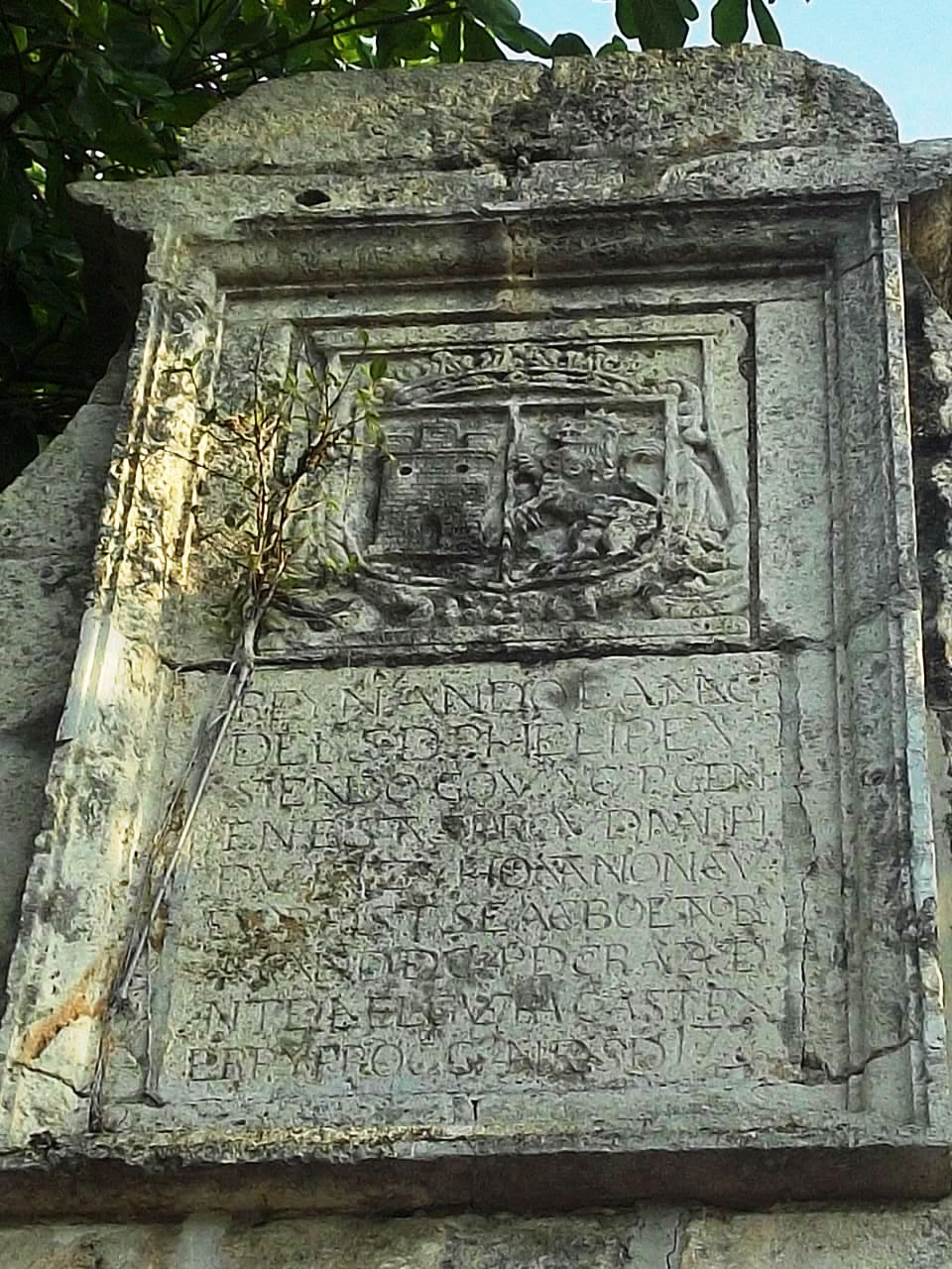 Puerta Sur del Parque Zoológico del Centenario en Mérida, Yucatán. El pórtico pertenecía al Matadero Viejo (rastro) de la época colonial ubicado en los cruzamientos de las calles 66 y 67 de la misma ciudad y en la parte superior ostenta el escudo de la ciudad de Mérida labrado en 1720 durante el mandato del gobernador y capitán general D. Juan Joseph de Vertiz y Ontañón. El rastro fue demolido en 1940 y el pórtico fue trasladado al ahora zoológico el 24 de enero de 1942. ("El escudo de armas de la ciudad de Mérida", H. Ayuntamiento de Mérida, 1978, Mérida, Yucatán, México. Reedición: 2006) Ver: El tesoro del "Centenario"